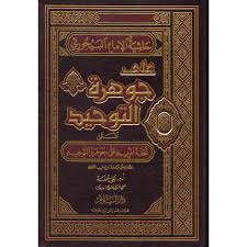 غلاف كتاب